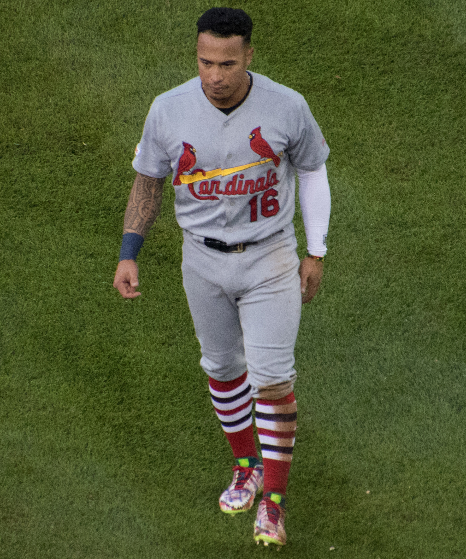 Kolten Wong